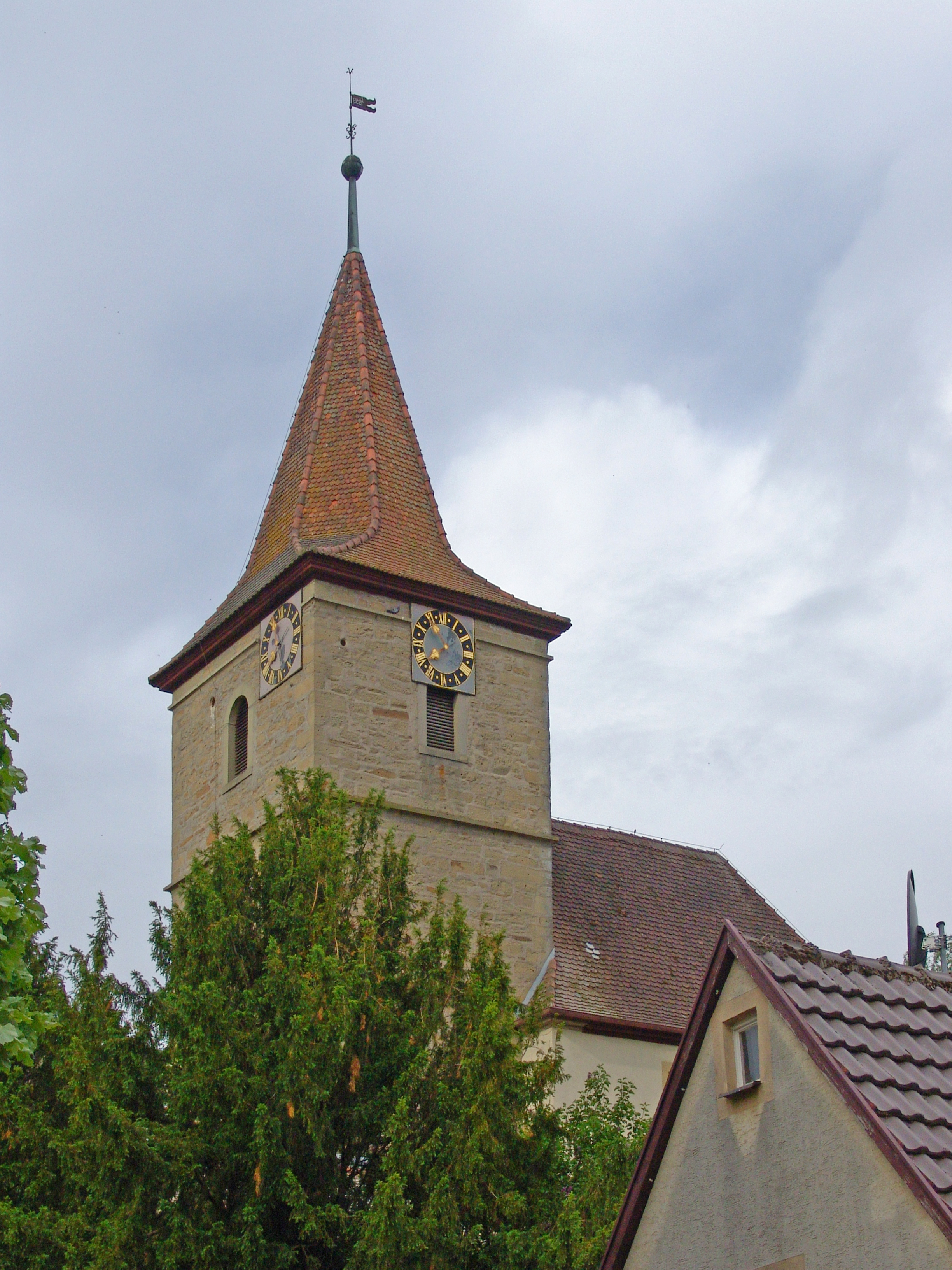 evang.luth. Kirche St. Nikolaus in Unterickelsheim